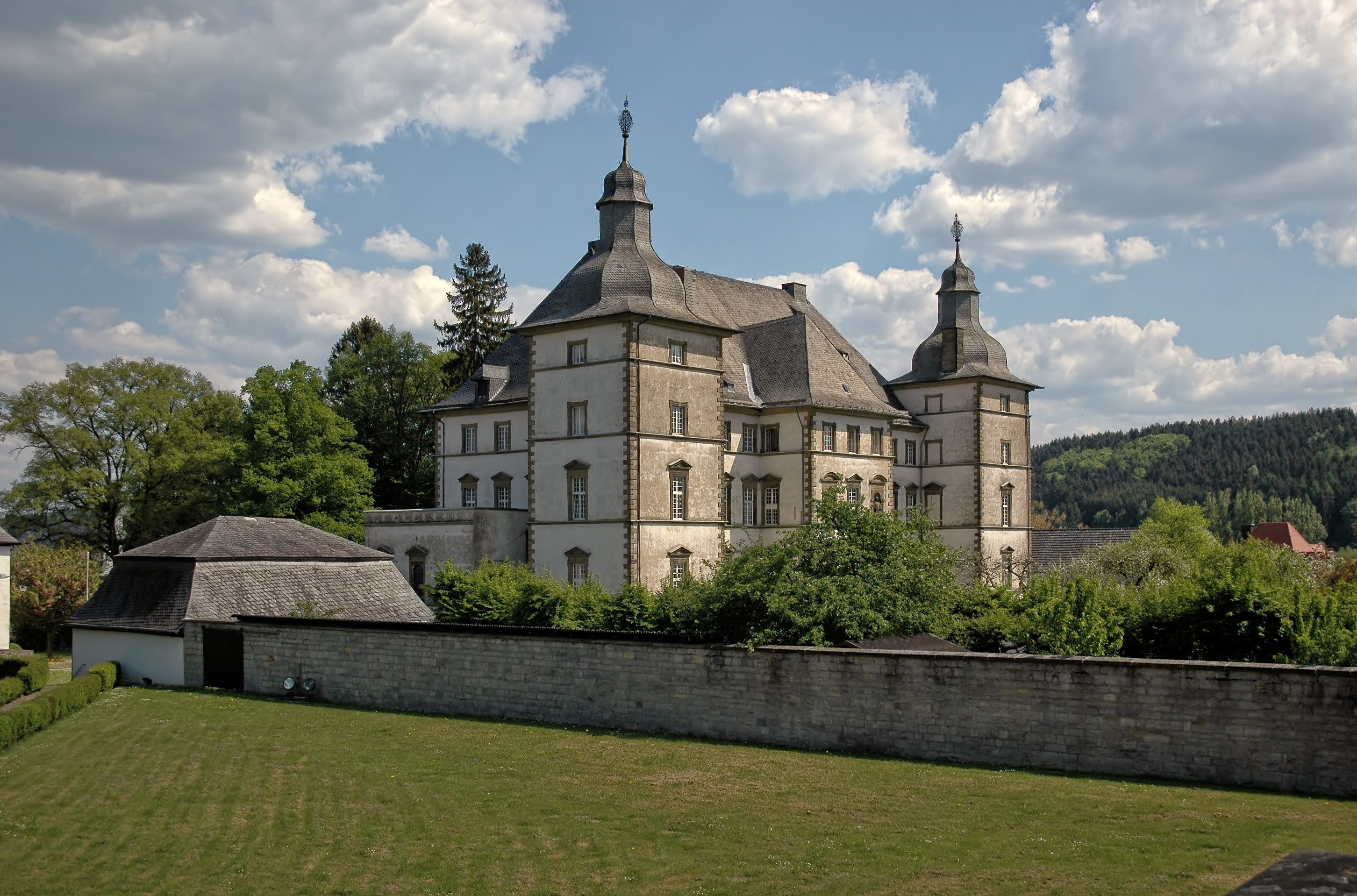 Deutschordensschloss in Mülheim/Möhne